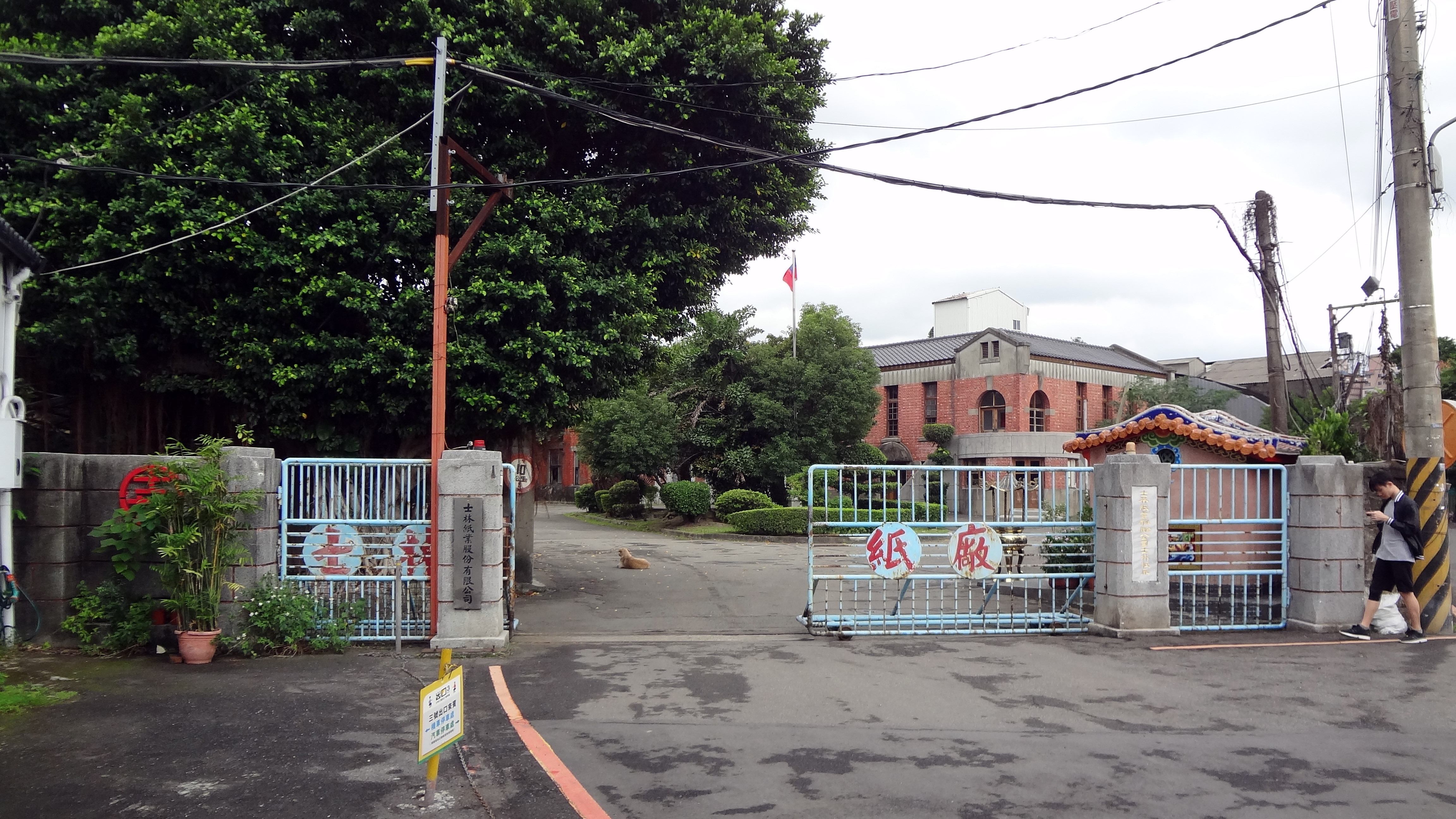 士林紙業總部，地址：臺北市士林區福德路31號。